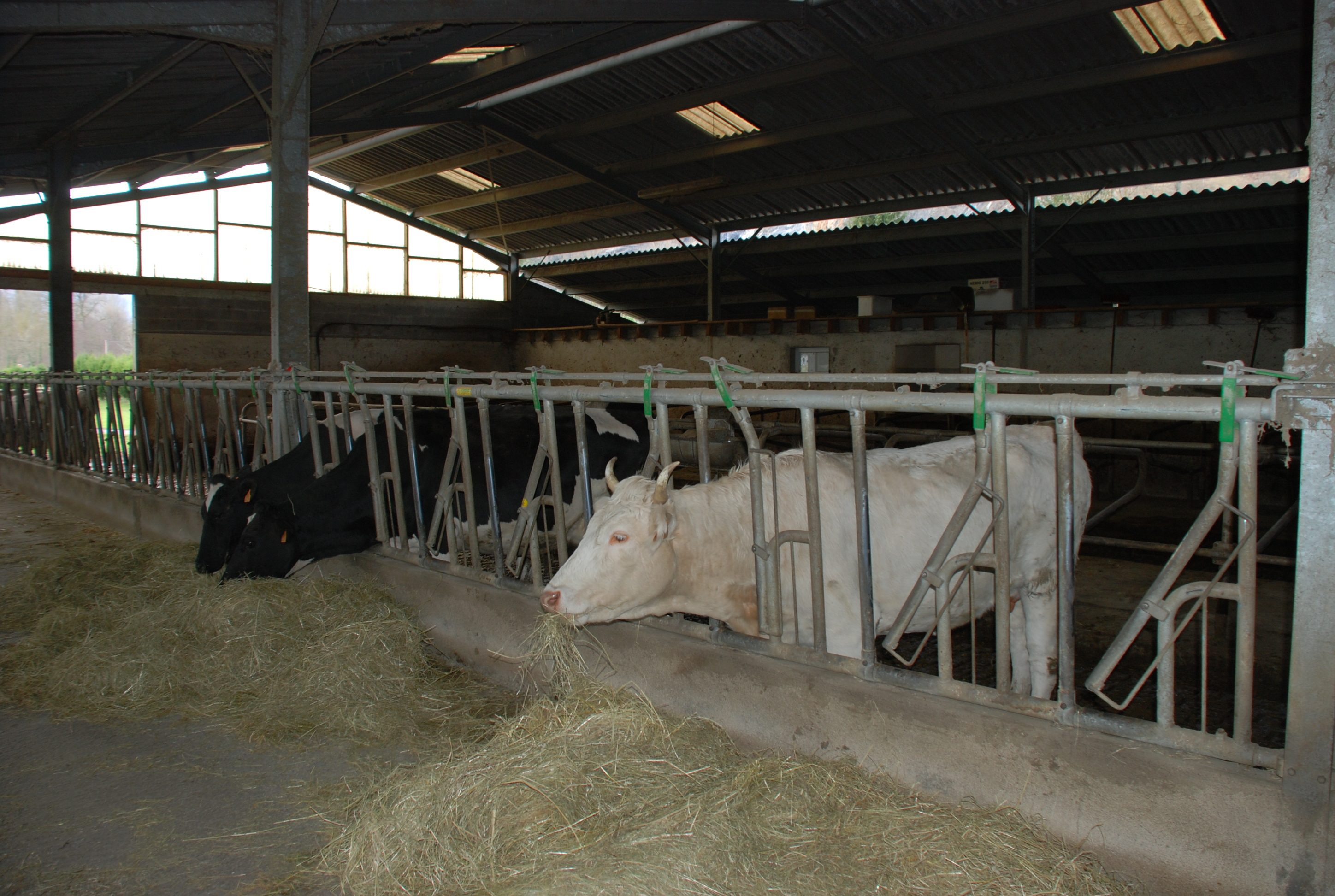 Photo de vache Lourdaise prise chez Bertrand Sassus, éleveur de vaches Prim'Holstein adhérent au réseau FARRE (agriculture raisonnée) et détenant deux sujets de race lourdaise dans son élevage. Son élevage se situe à Ger, village situé en bordure du gave de Pau, rive droite, à l'entrée du Lavedan, en venant de Lourdes.